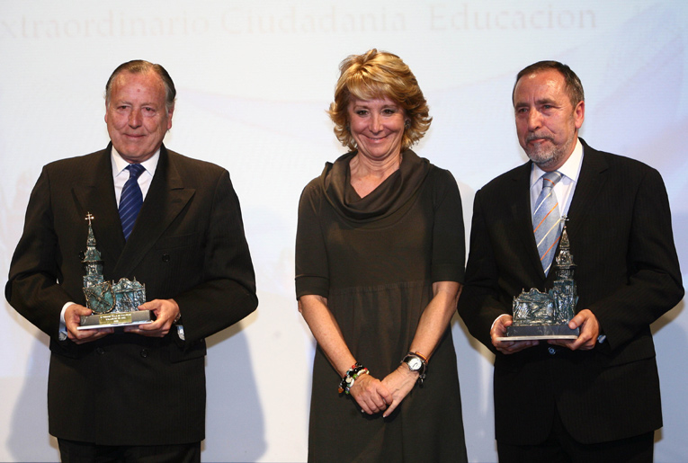 Esperanza Aguirre entrega los IX Premios Villa de Vallecas, en la categoría de Vallecas Oro y con motivo del XXX aniversario de la constitución de los ayuntamientos democráticos, a José María Álvarez del Manzano y a Juan Barranco